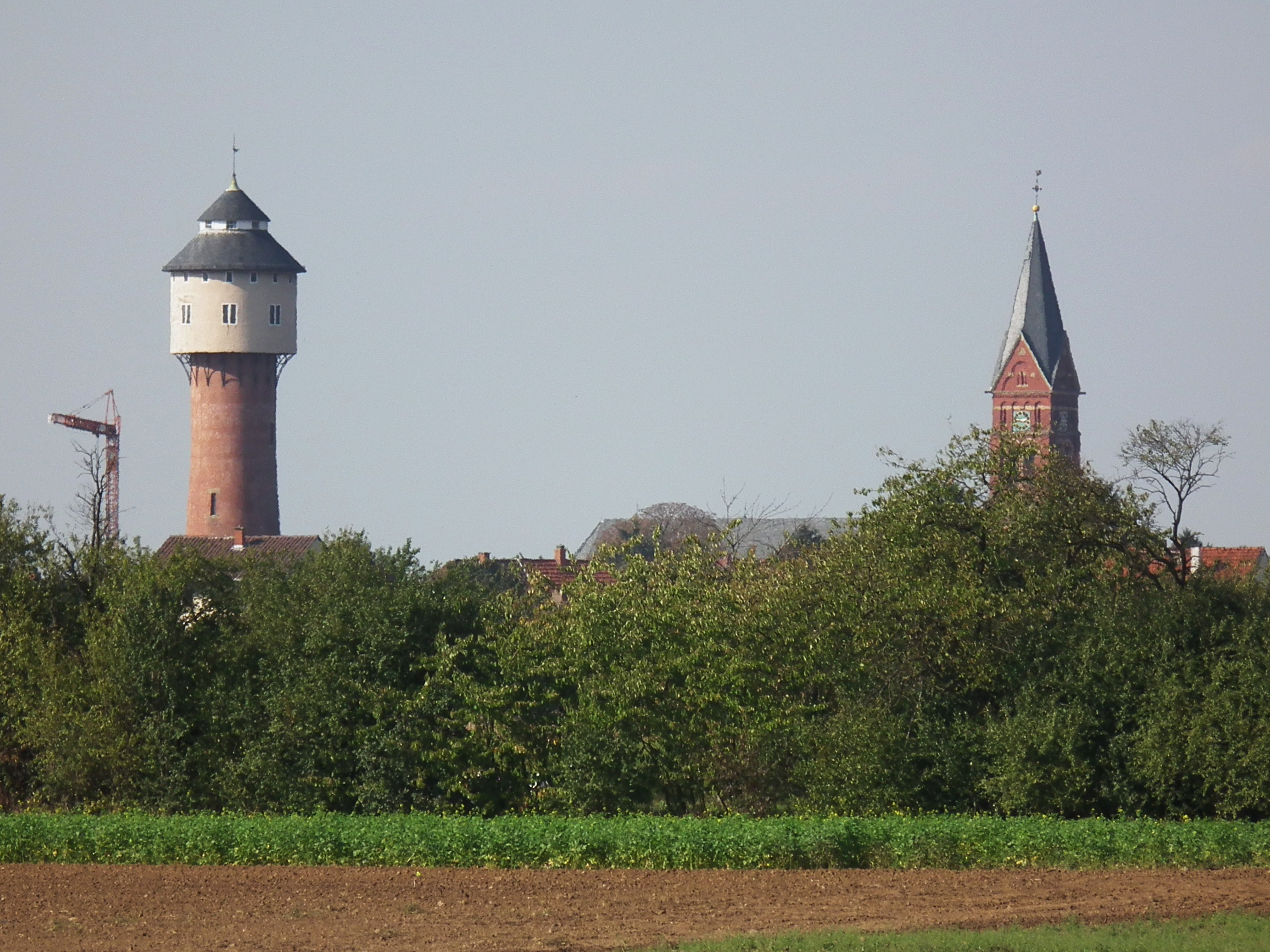 Wasserturm und Kirchturm St. Nikolaus in Plankstadt (Baden-Württemberg, Deutschland)